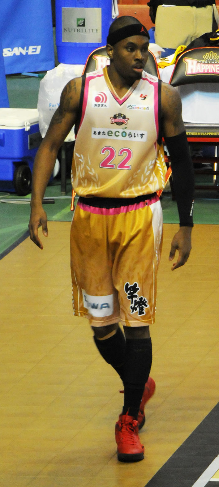 秋田ノーザンハピネッツ、セック・ヘンリー選手。秋田市立体育館で。